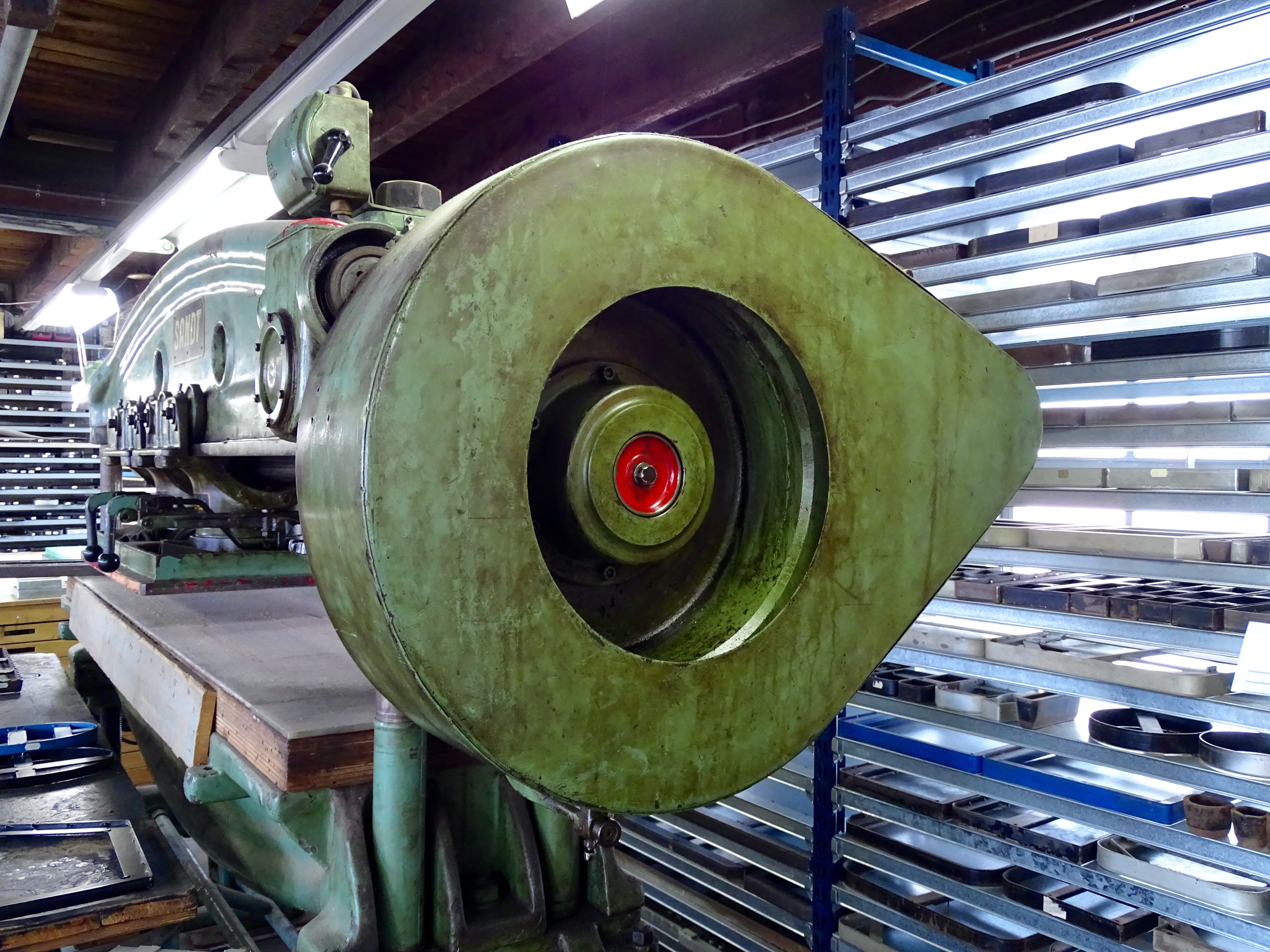 Dit is een oude stansmachine. Een karrebalkstans. Hier kunnen vormen mee uit het leer gestanst worden. De stansvormen die hiervoor gebruikt kunnen worden liggen op de achtergrond.